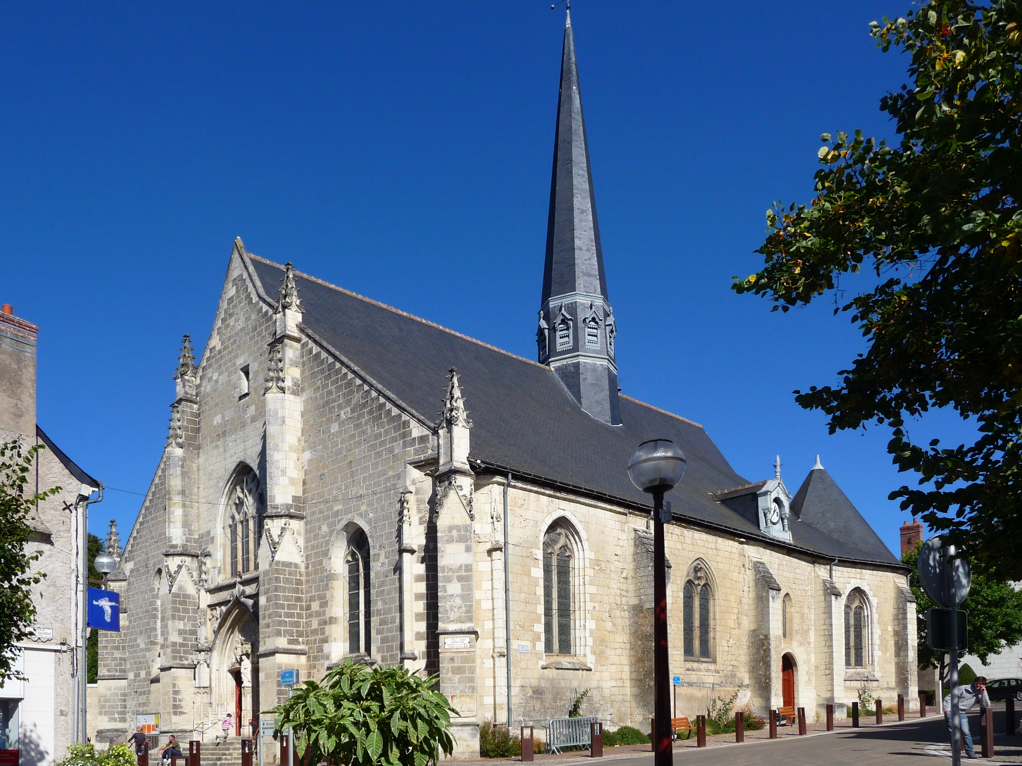 Vue d'ensemble de l'église de Fondettes, photo prise du Sud Est.